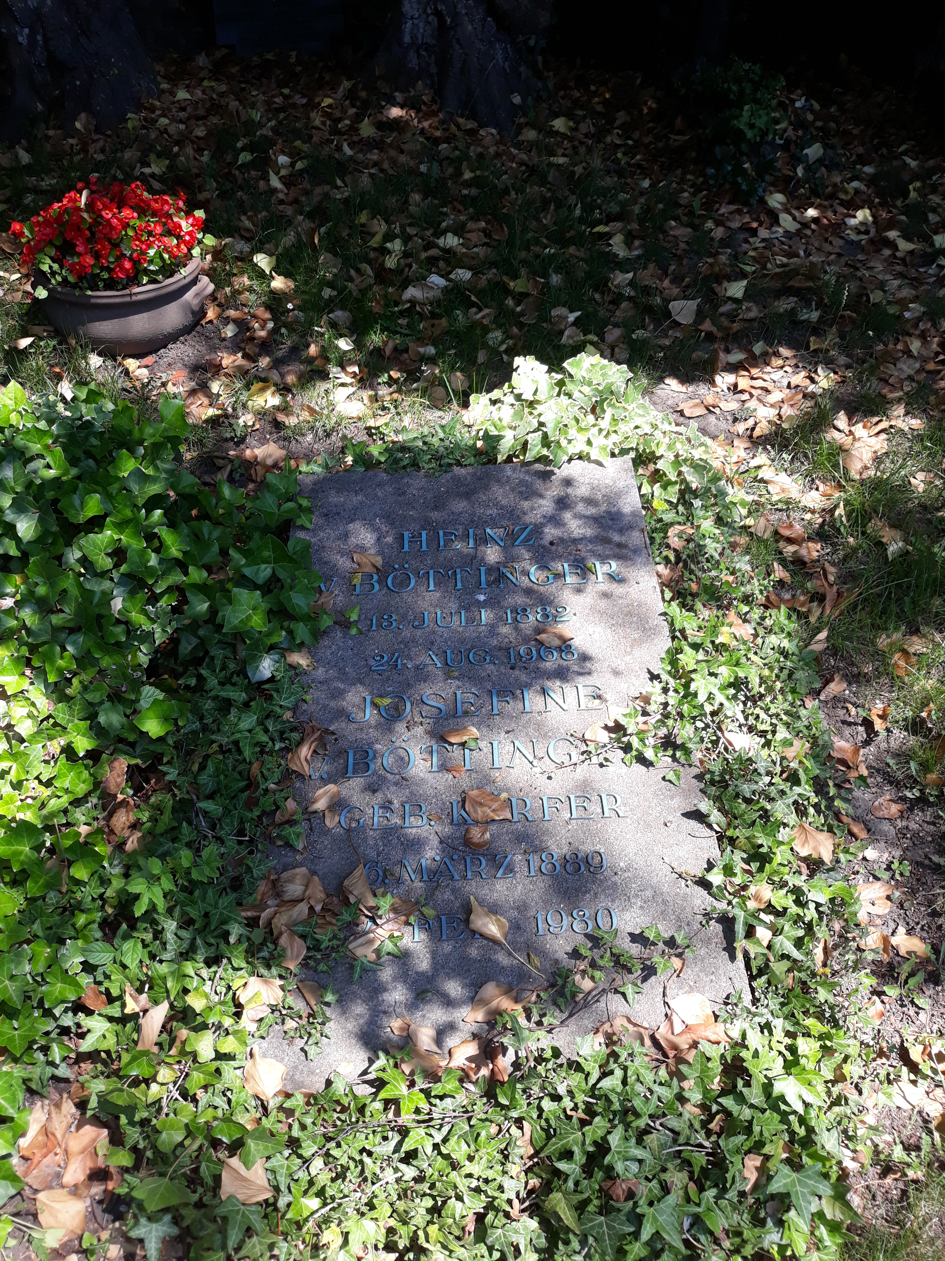 Das Grab des deutschen Diplomaten Heinz von Boetinger und seiner Ehefrau Josefine Körfer auf dem Lutherischen Friedhof Hochstraße in Wuppertal-Elberfeld.